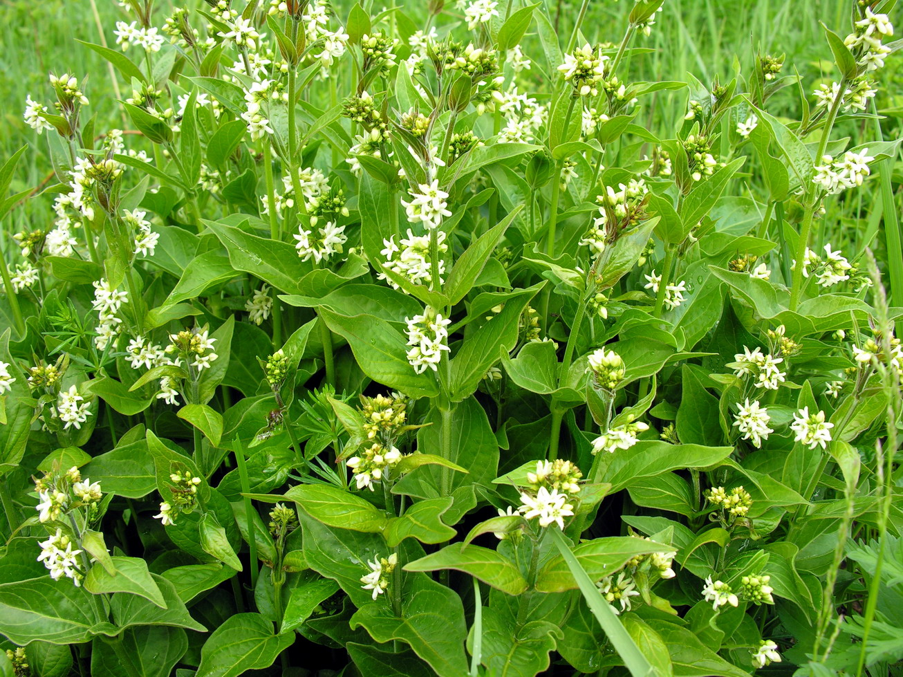 Šlakinė kregždūnė (Vincetoxicum hirundinaria) Šeima. Stepukiniai (Apocynaceae) Fotografavo: Algirdas, 2006 m. gegužės 27 d., Lietuva